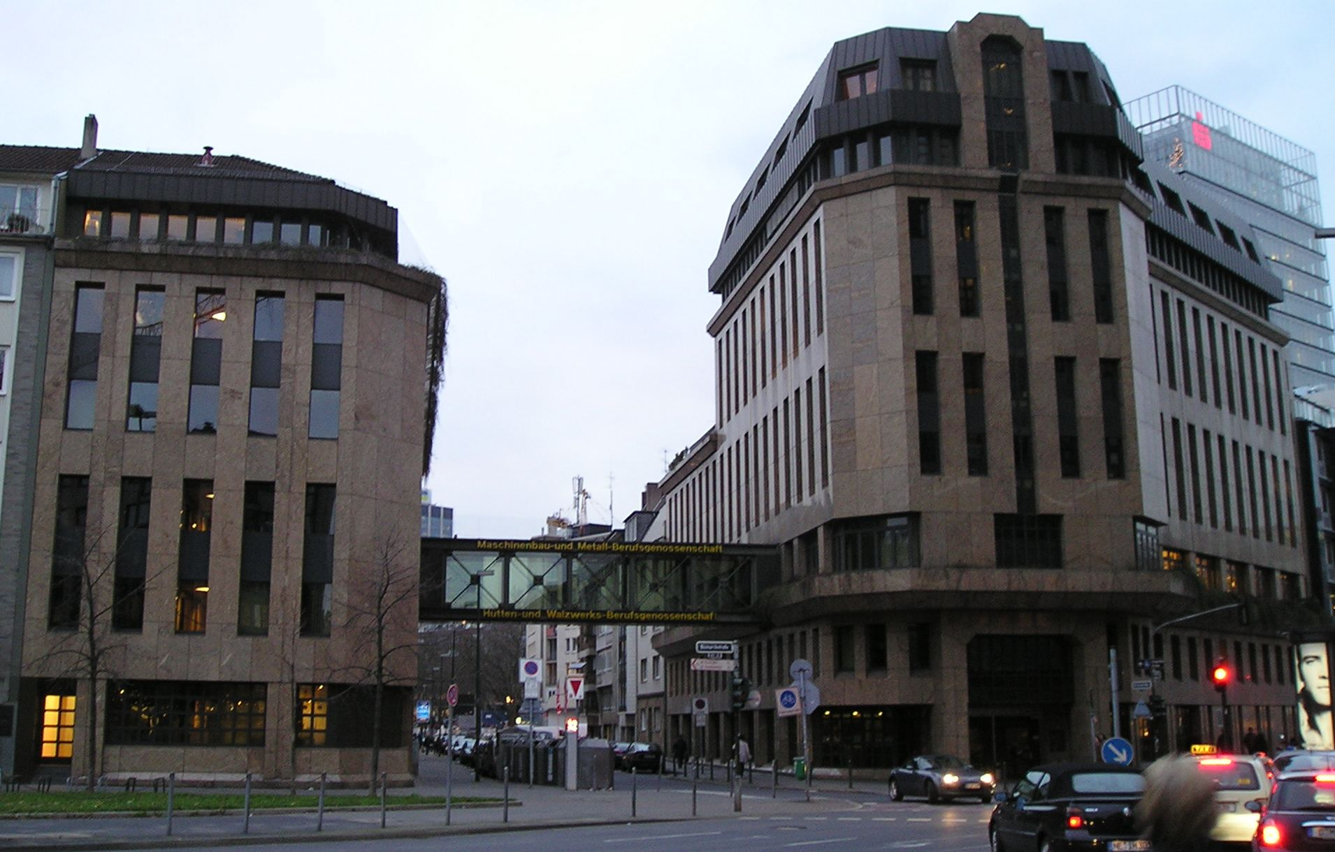 Building of the Maschinenbau- und Metallberufsgenossenschaft in Düsseldorf